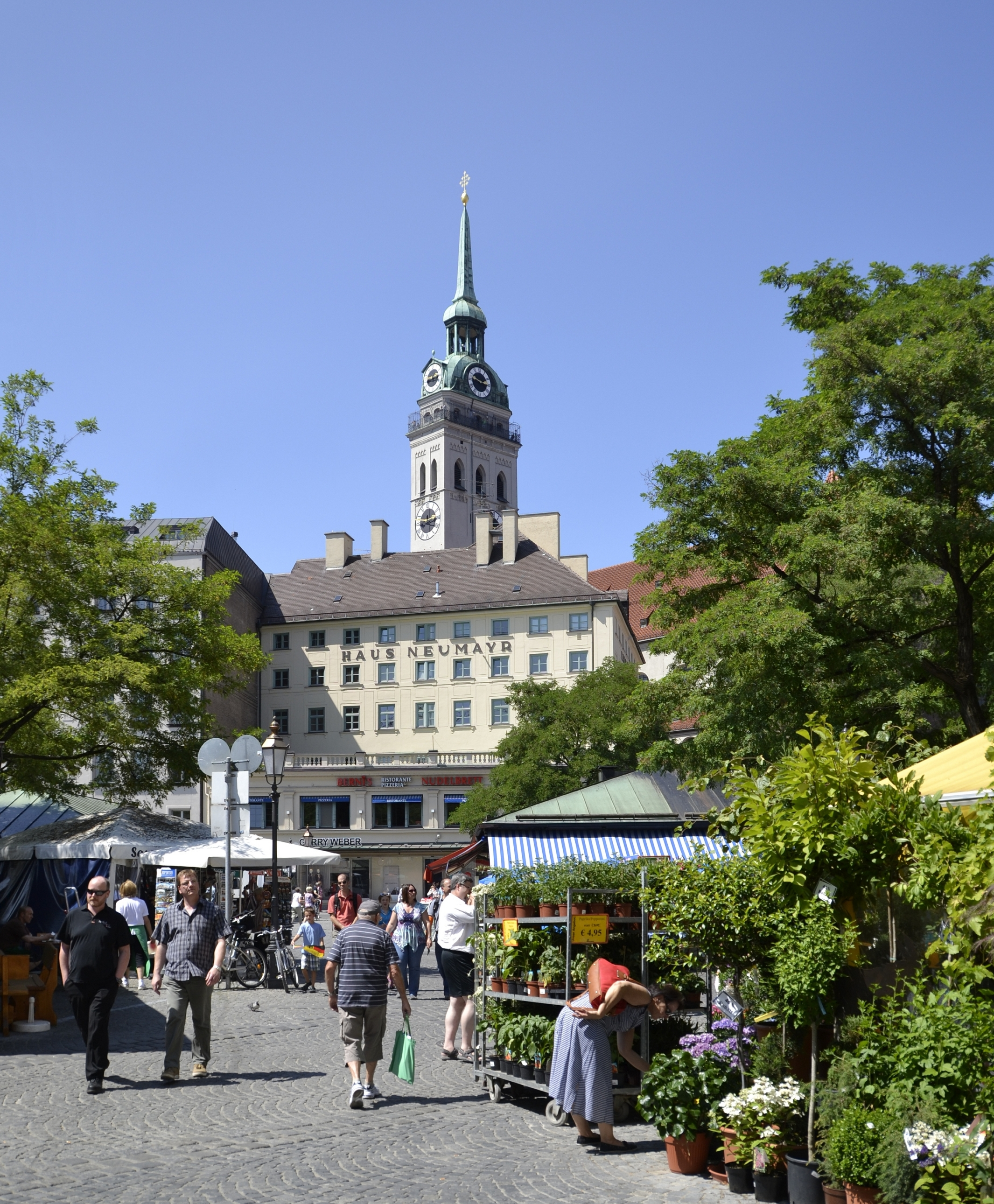 Im Münchener Viktualienmarkt im Sommer 2013.